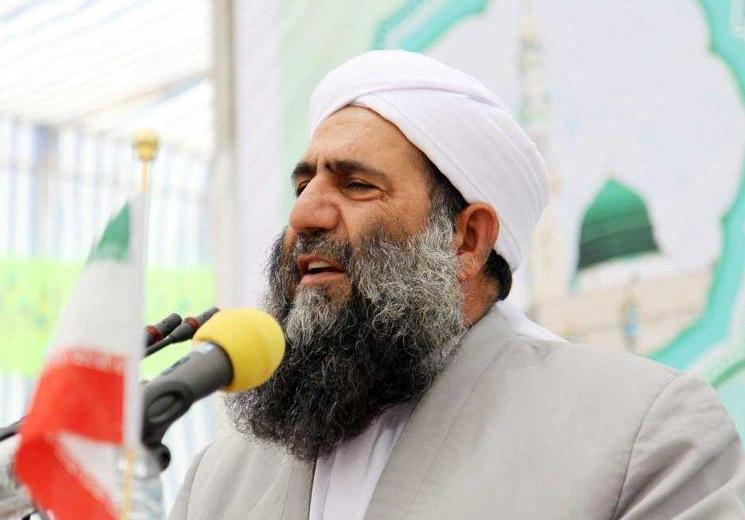 عکسی از مولانا احمد نارویی در هنگام سخنرانی